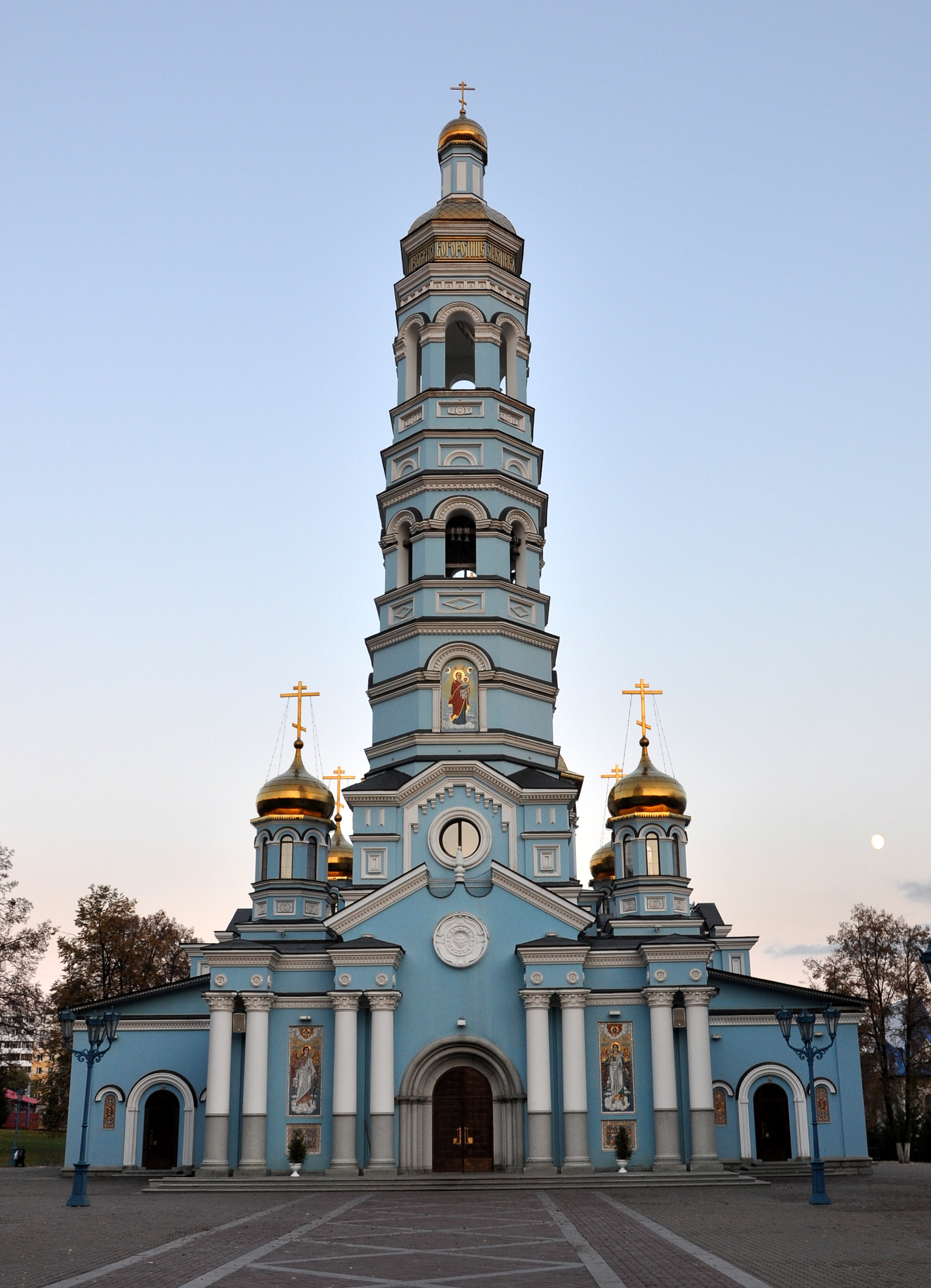 Храм Рождества Богородицы является одним из красивейших архитектурных памятников Уфы и ее главным православным храмом. Строительство собора началось в 1889 году, однако работы были приостановлены из-за нехватки средств. На помощь епархии пришел известный уфимский купец Н.М. Патокин. Он выделил необходимую сумму и храм был возведен. Церковь была построена из кирпича, как и трехъярусная колокольня. Купола были обиты железом и увенчаны железными крестами, покрытыми бронзой. В августе 1909 года на колокольню были подняты восемь колоколов, вес самого большого из которых составлял более 50 пудов, а самого маленького - 10 фунтов. Общая высота церкви, включая колокольню, составила 21 сажень, или около 45 метров. В том же году состоялось освящение храма Рождества Пресвятой Богородицы. После революции храм не был закрыт и функционировал на протяжении 20-х - начала 30-х годов. Однако в 1934 году власти города закрывают церковь, а все церковное имущество к тому времени уже было разграблено. Старожилы вспоминают, что в разное время в здании размещалась тюрьма, небольшой завод, а затем кинотеатр. Только в 1991 году храм был возвращен Русской православной церкви и после продолжительной реконструкции открыл свои двери для верующих.